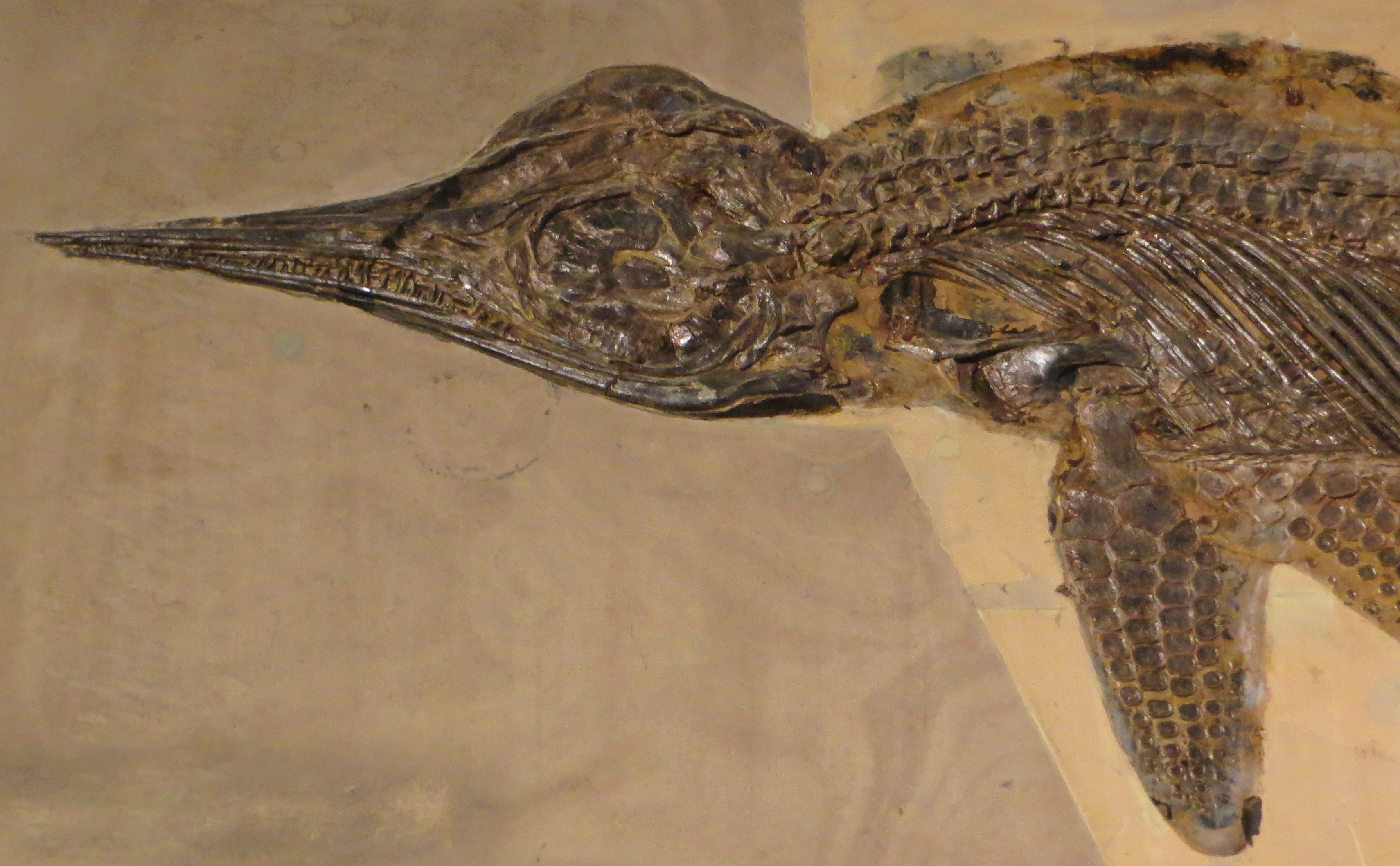 Fossil of Hauffiopteryx, an extinct reptile- Took the picture at Museum of Paleontology, Tuebingen